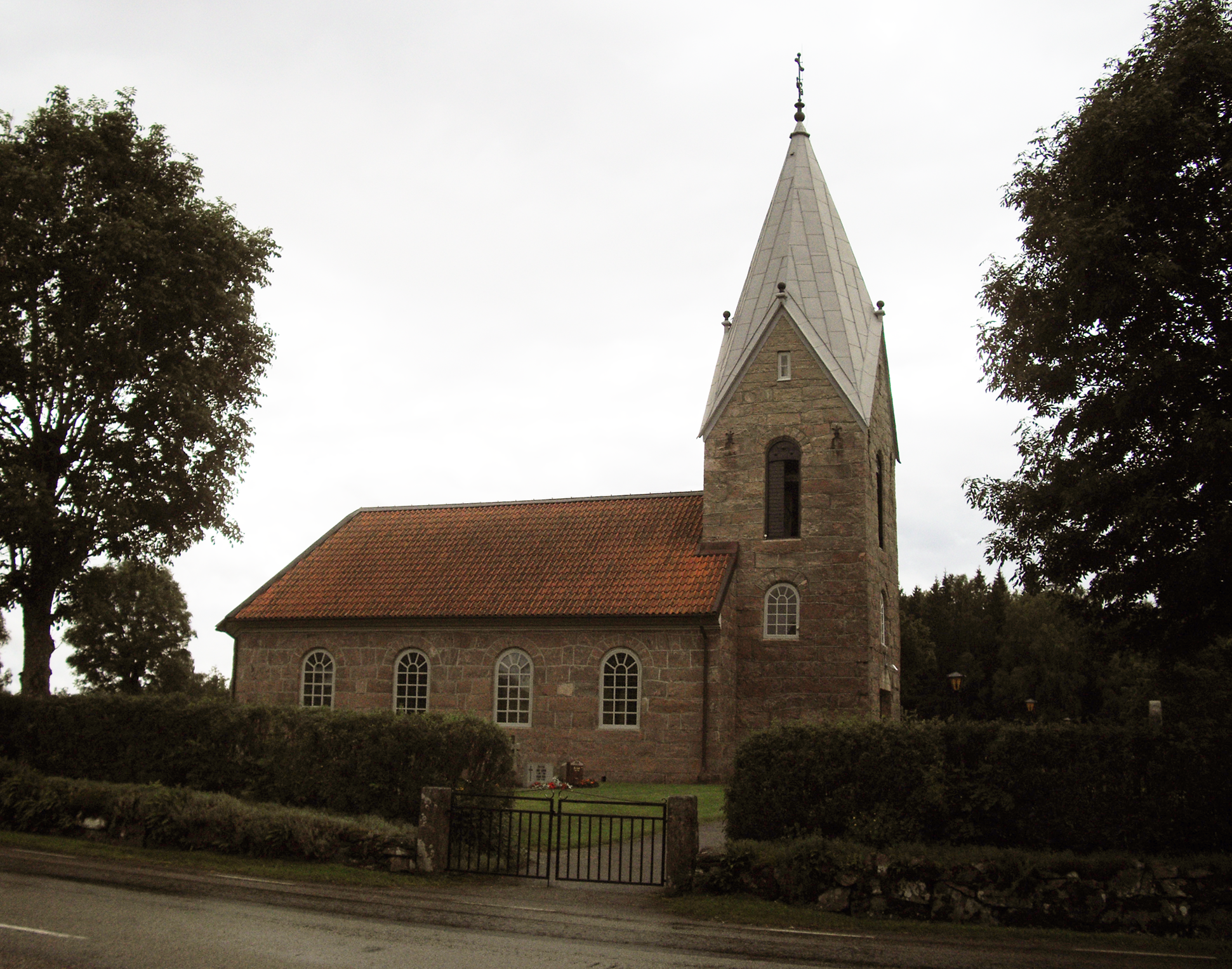 Broddarps kyrka